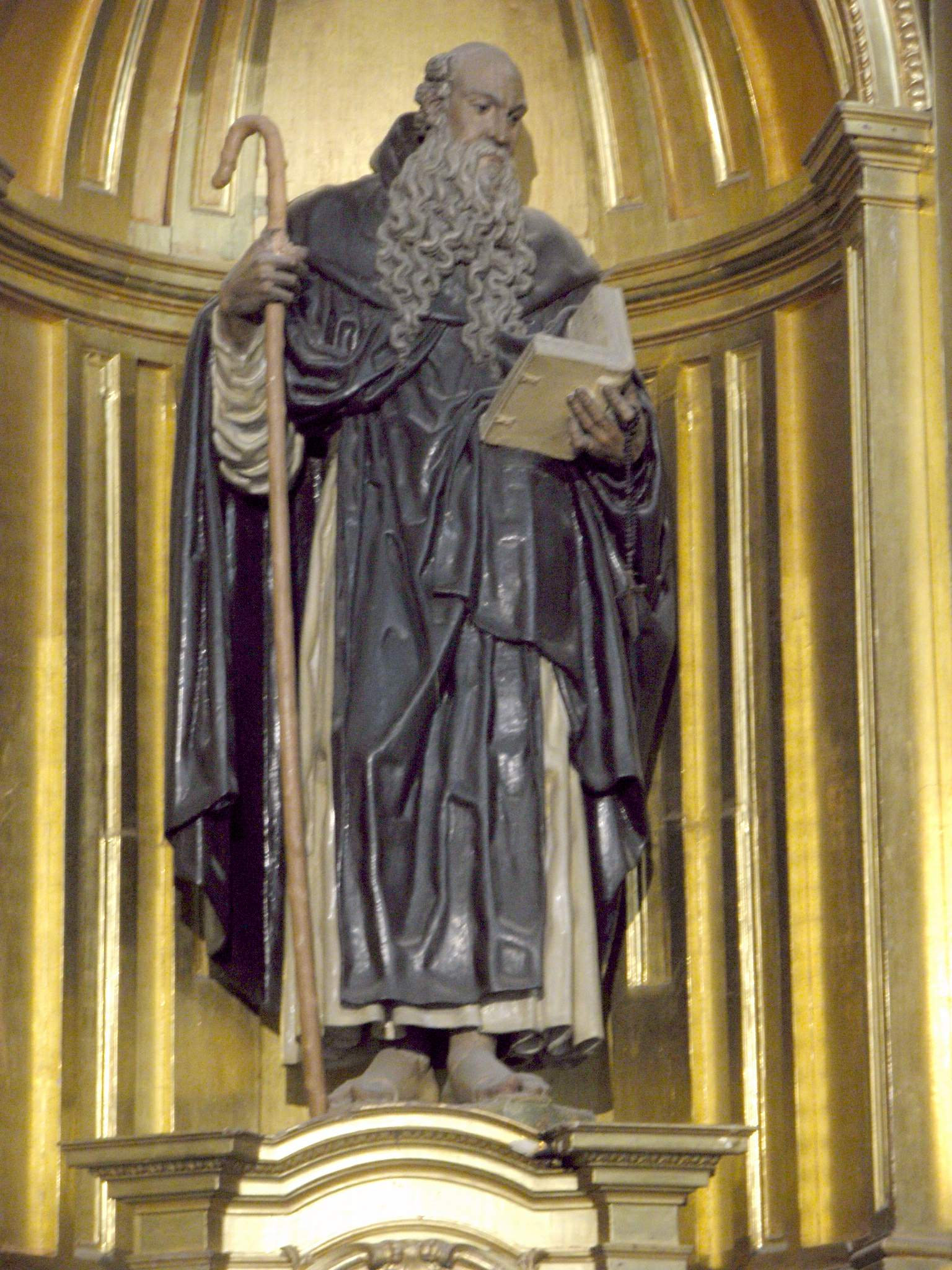 Segovia - Catedral, Capilla de San Frutos, San Valentin y Santa Engracia